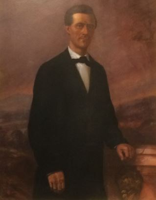 Peinture d'Achilles Bigot. Portrait du commercant Jean Jacques Bonnefil, immigration francaise au Costa Rica